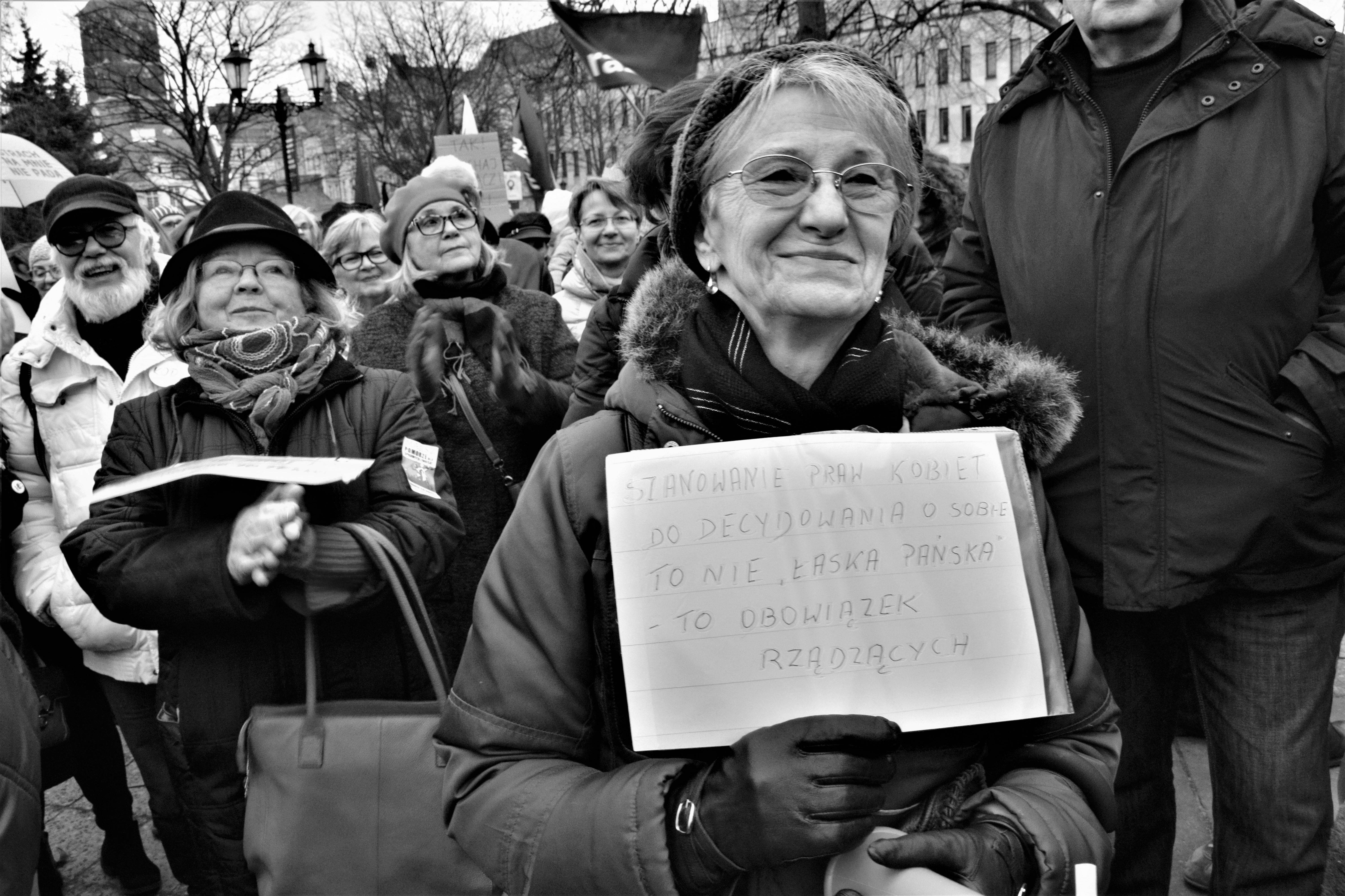 Międzynarodowy Strajk Kobiet. Manifa 2017 w Król Jan III Sobieski (Pomnik)